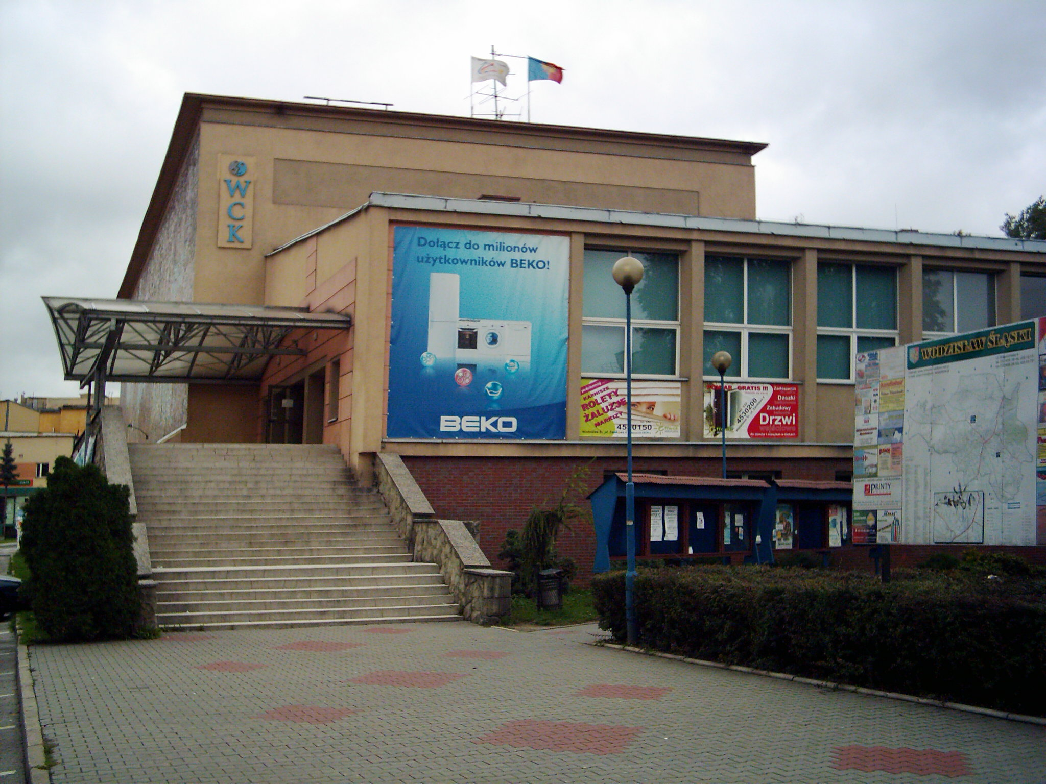 Wodzisław Śląski - Wodzisławskie Cetrum Kultury.